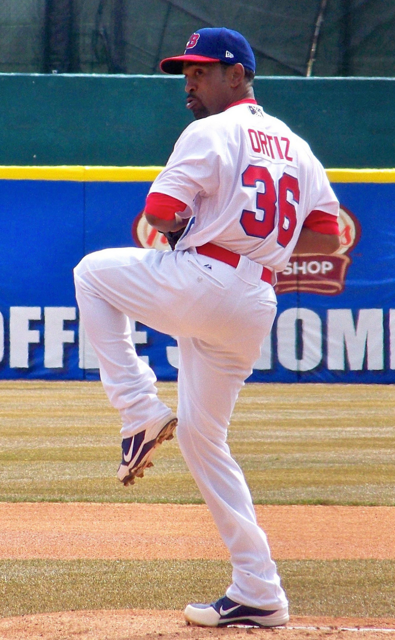 Ramón Ortiz